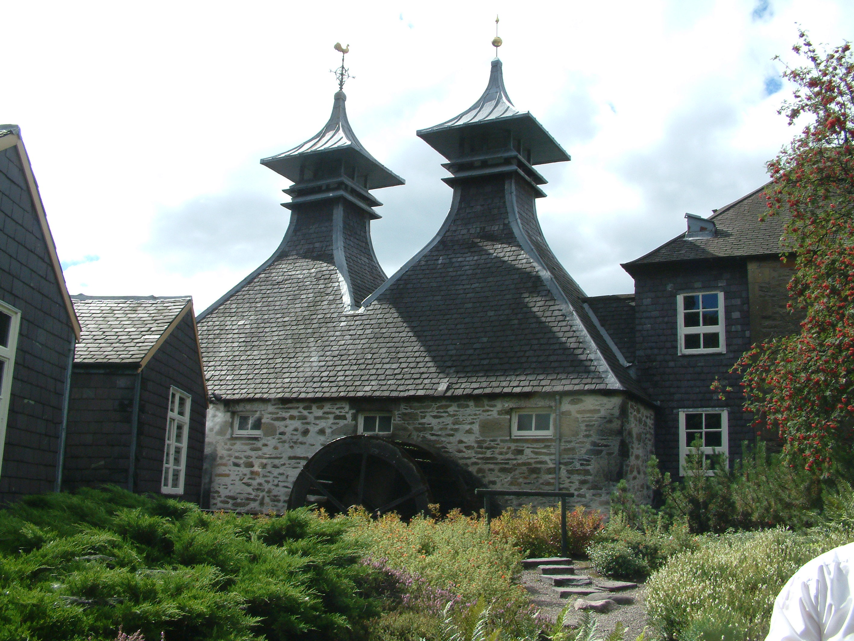 foto StaraBlazkova 2006